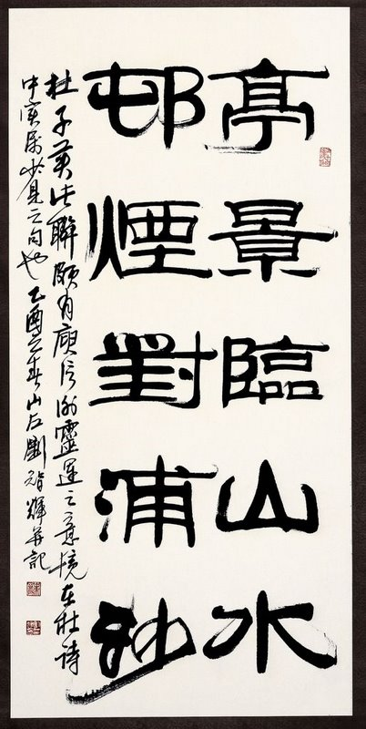 杜甫诗句